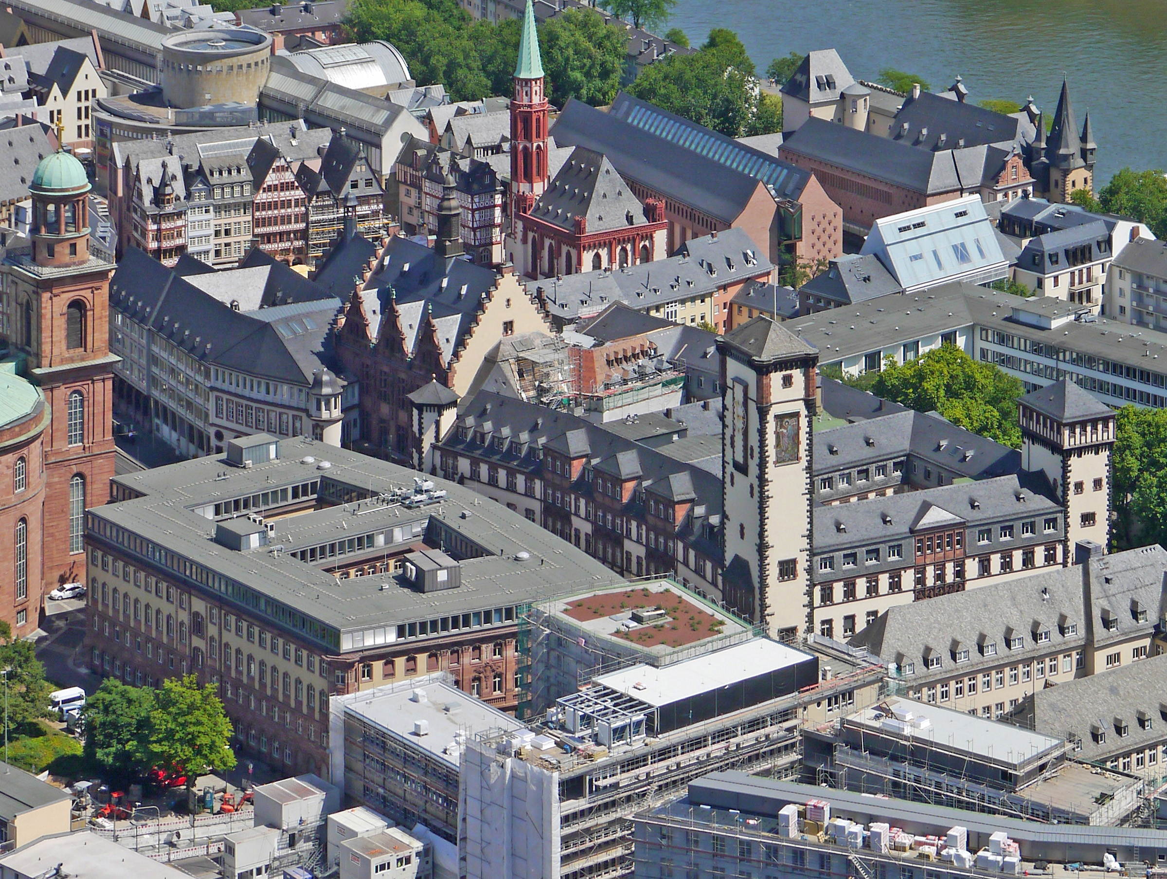 Rathauskomplex, 2018 in Frankfurt am Main vom Maintower aus.